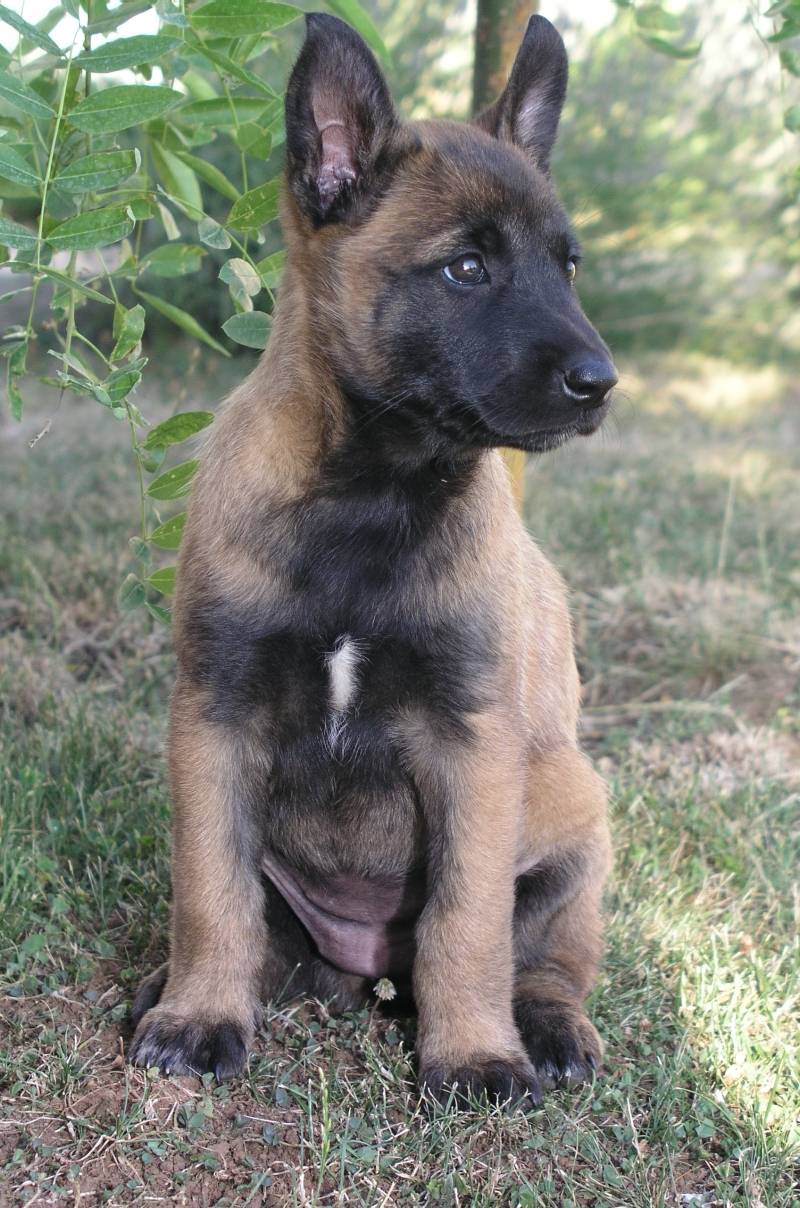 Malinois, (Belgijski ovčar), Croatia